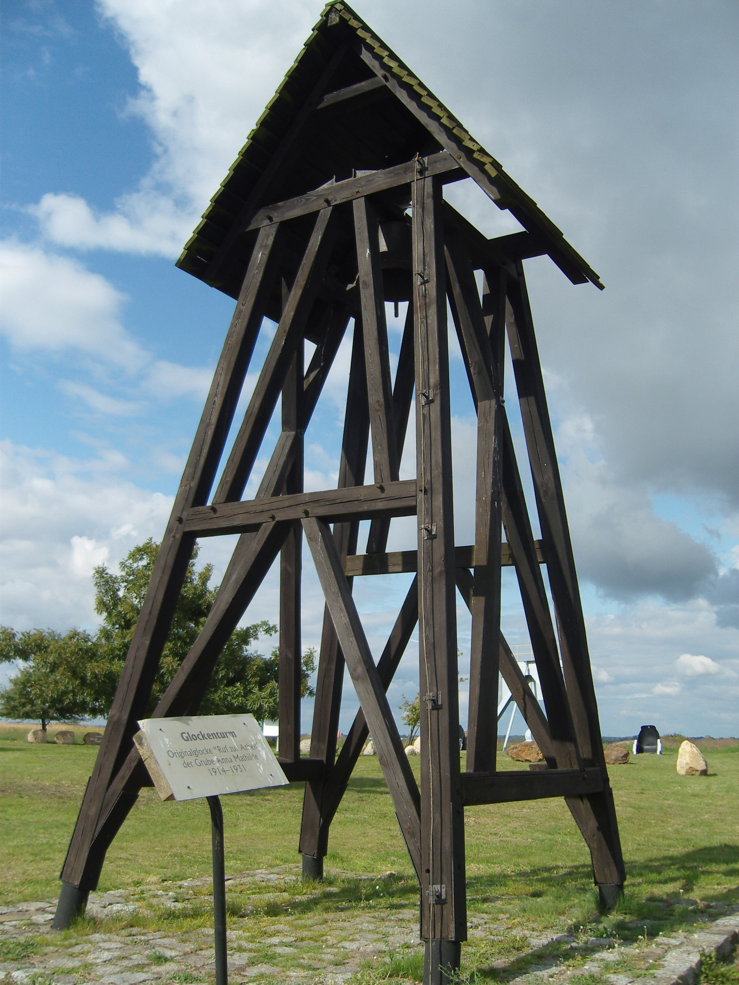 Glockenturm am Aussichtspunkt Reppist mit der Glock Ruf zur Arbeit der Grube Anna-Mathilde bei Sedlitz